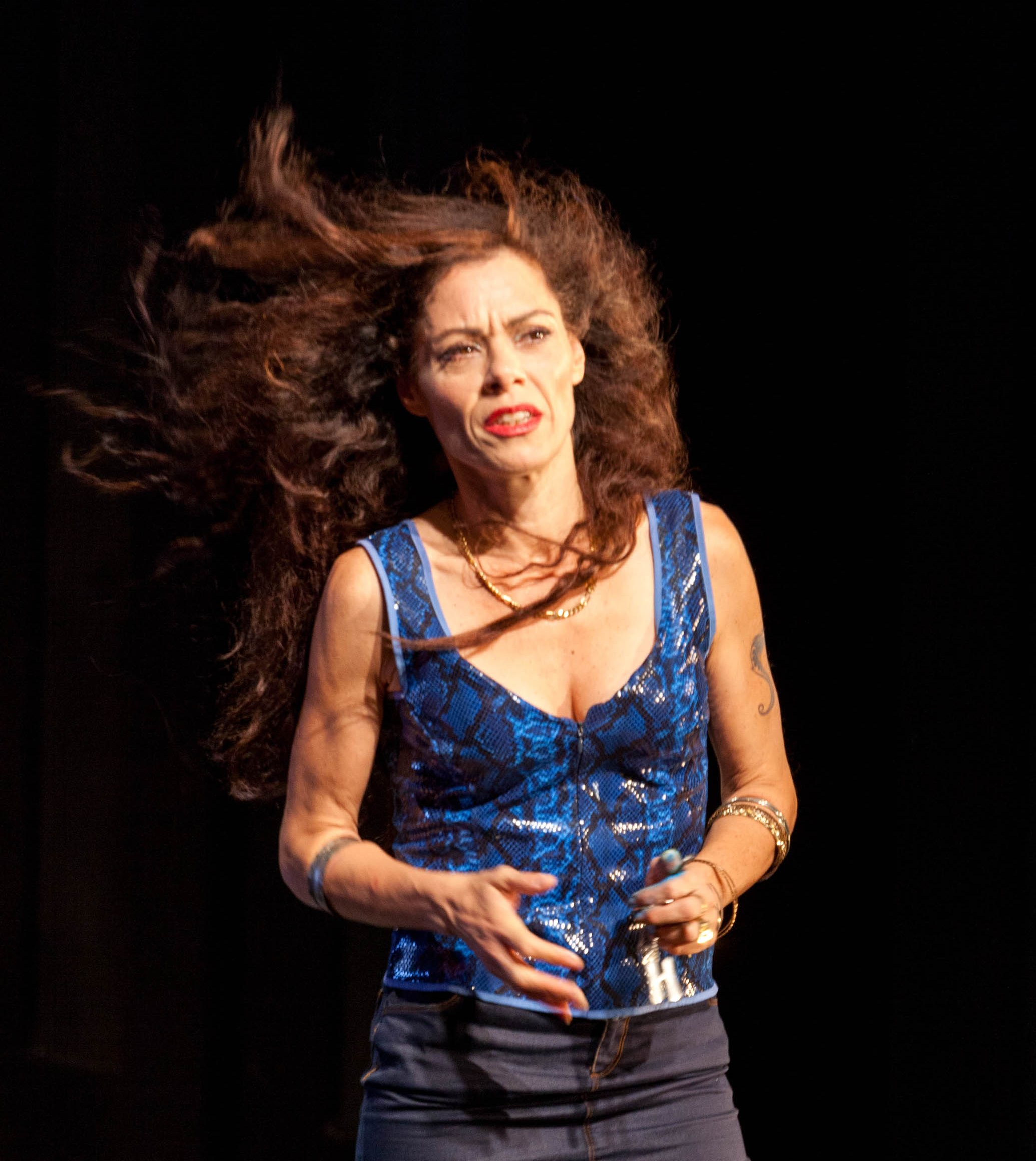 מיקי פלג רוטשטיין בתפקיד יוניס בהצגה "חשמלית ושמה תשוקה"